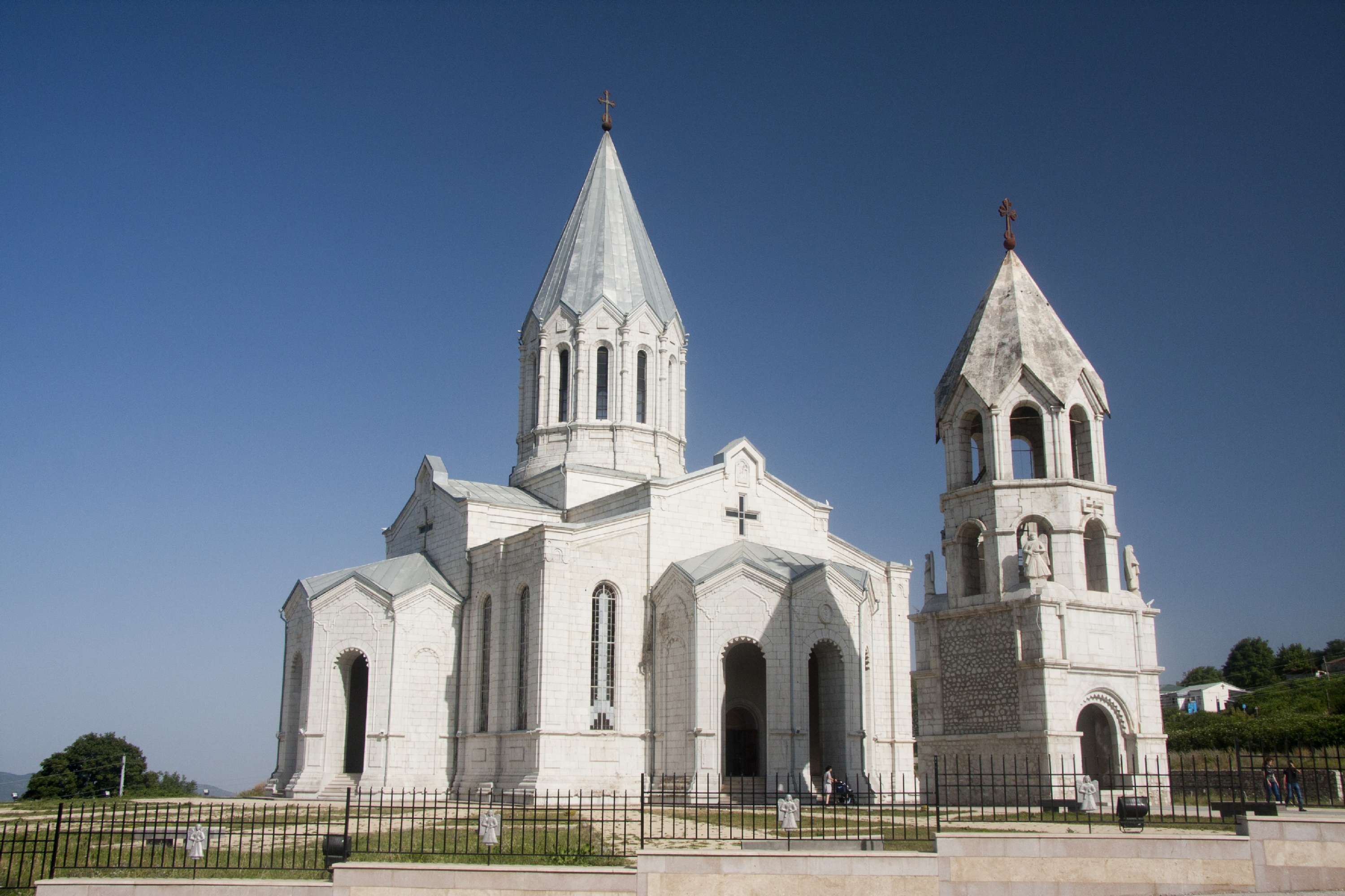 Şuşa şəhərində Qazançı kilsəsi. XIX əsr. Ə.Haqverdiyev küçəsi, 19.